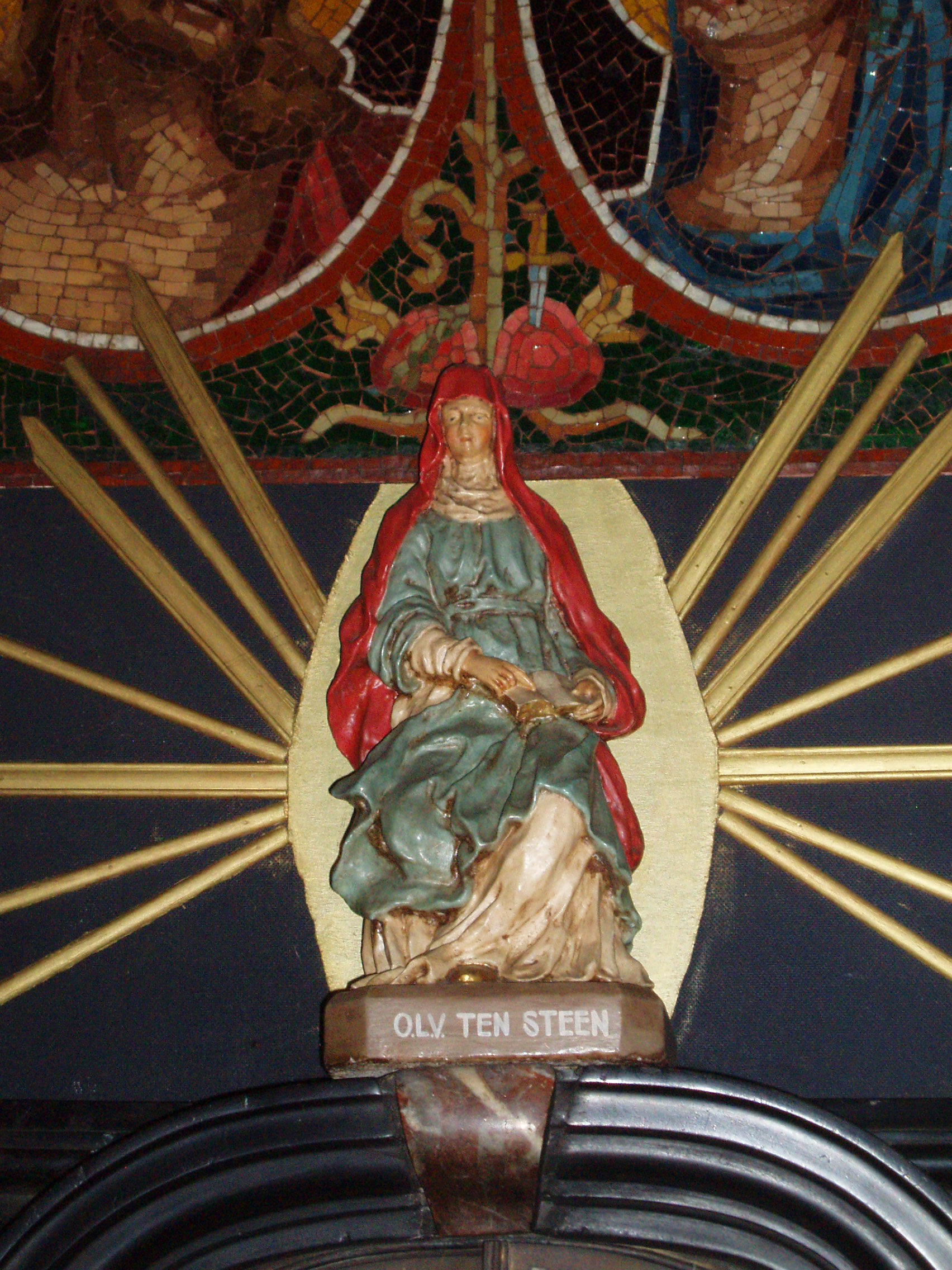 Beeld van O.L.V. ten Steen in de Onze-Lieve-Vrouw ten Steenkapel